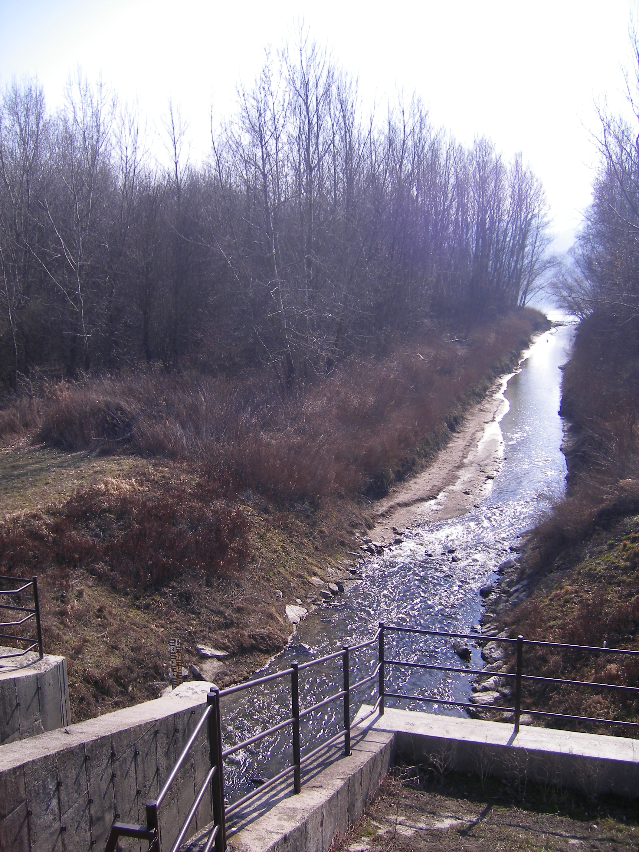 a Zsitva torkolata Zsitvatő közelében, de még Pat területén (rossz név)